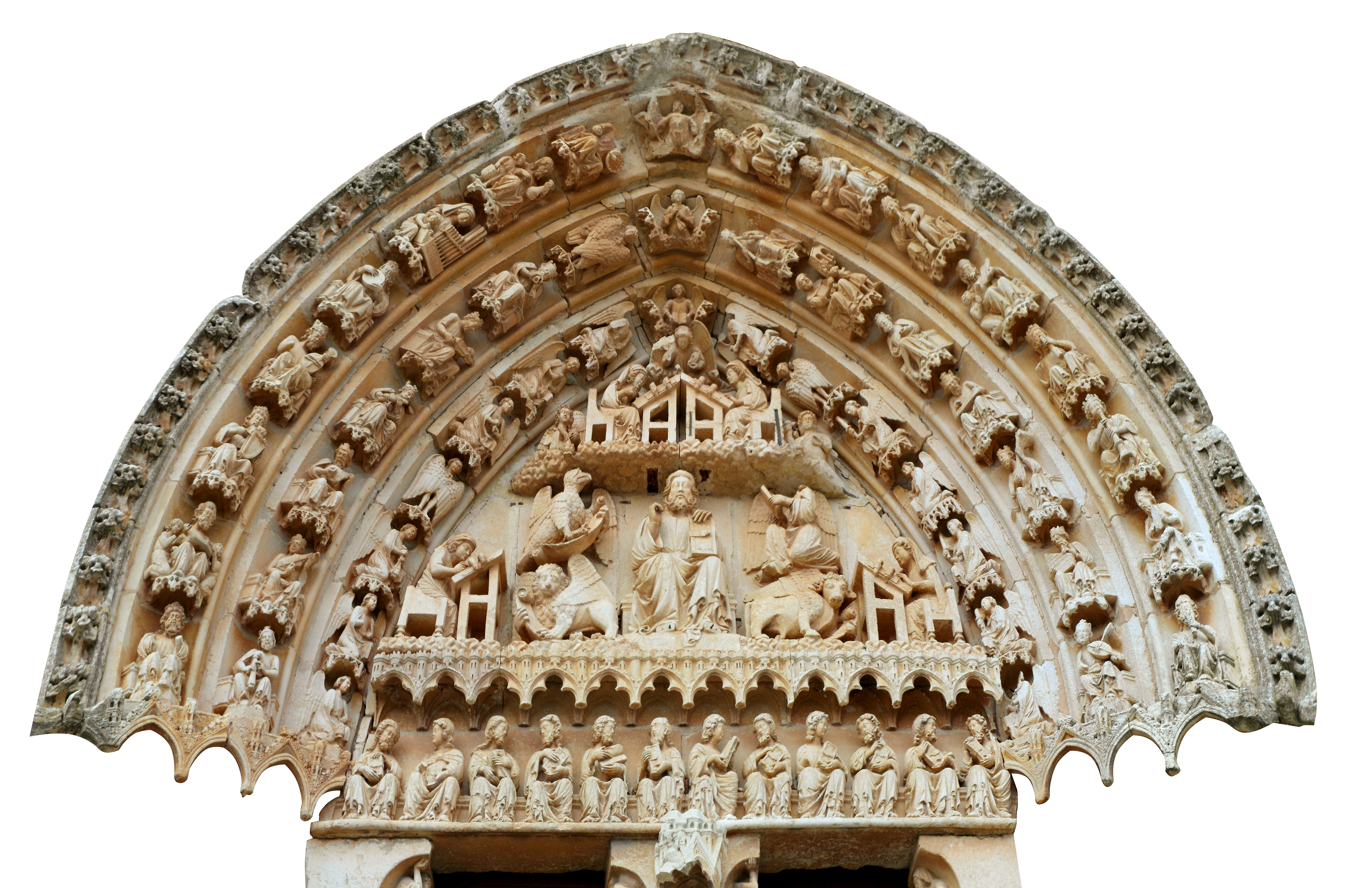 Sasamón, Burgos.